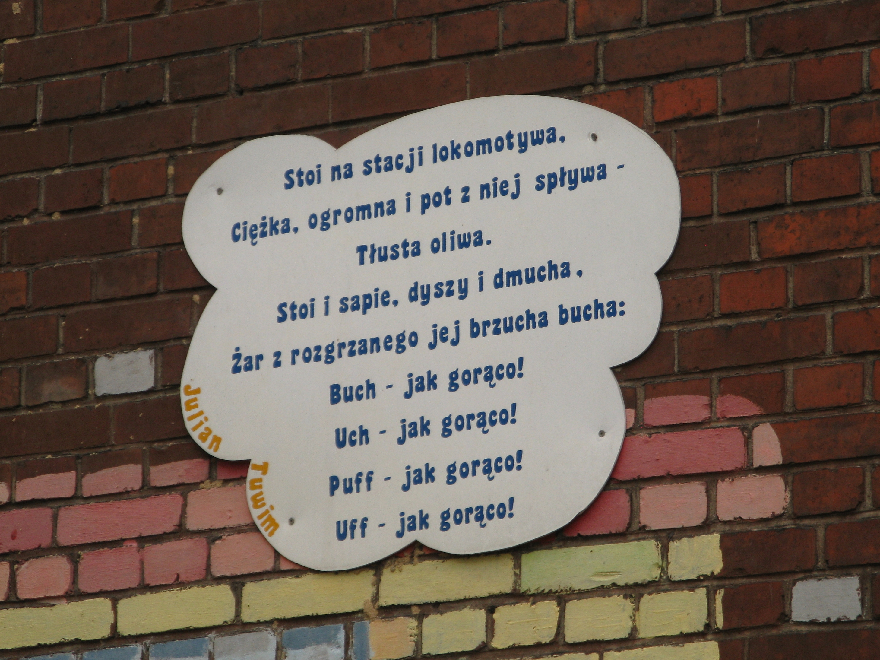 Fragment wiersza „Lokomotywa” Juliana Tuwima, ściana budynku przy ulicy Powstańców 12a w Mysłowicach.